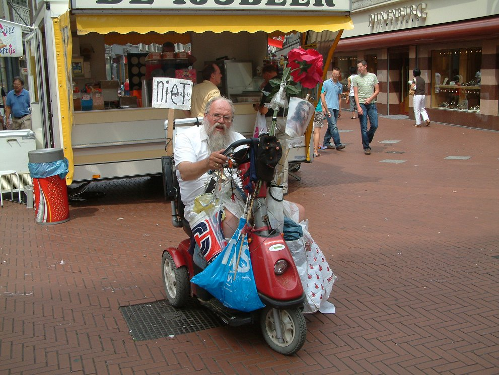 Arnol Kox, stadsprediker, schreeuwjezus, straatpastoor te Eindhoven.